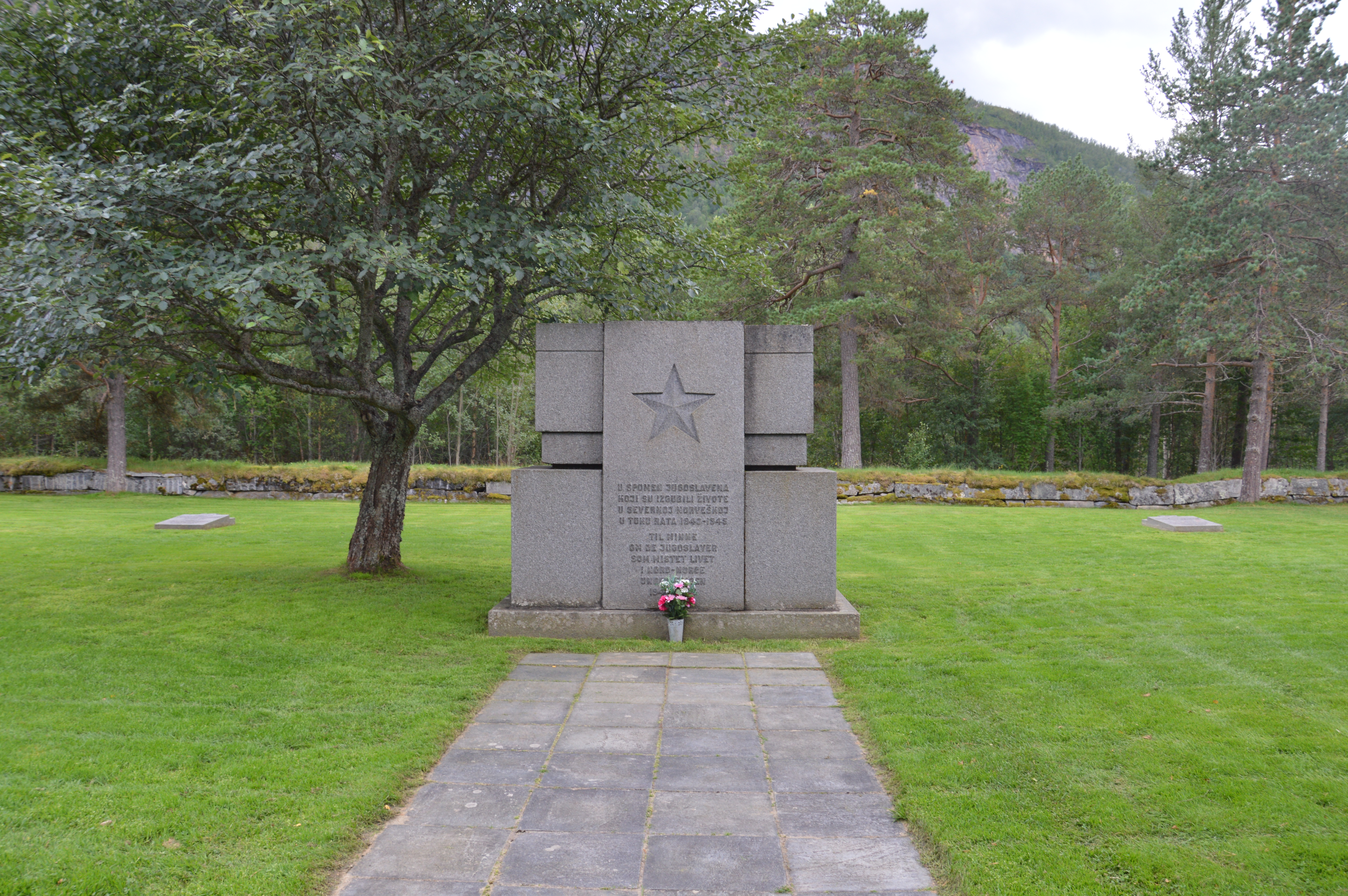 Churchyard for in Botn, Saltdal, Norway, for Jugoslav war prisoners who worked on the road